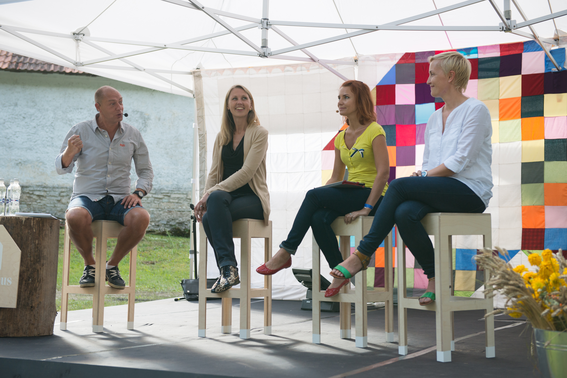 Arvamusfestival 2014: "Eesti tark võim"